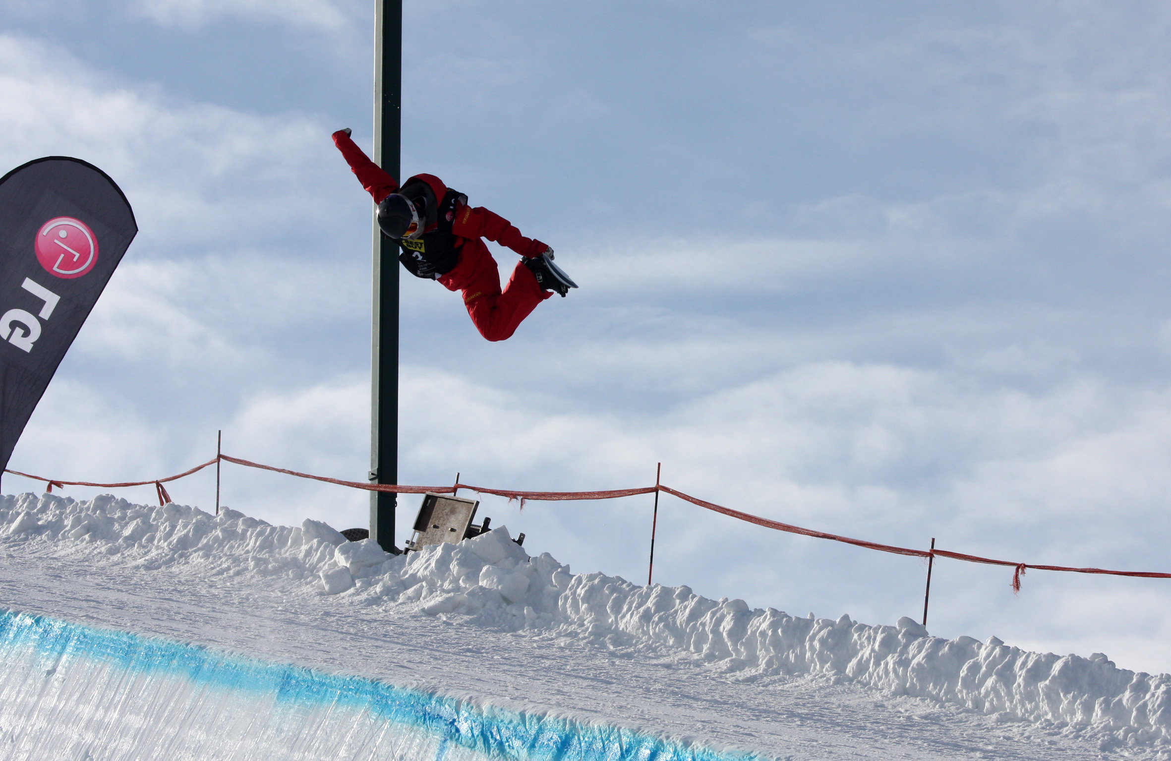 Calgary_HP_Jiayu_Liu_CHN_03